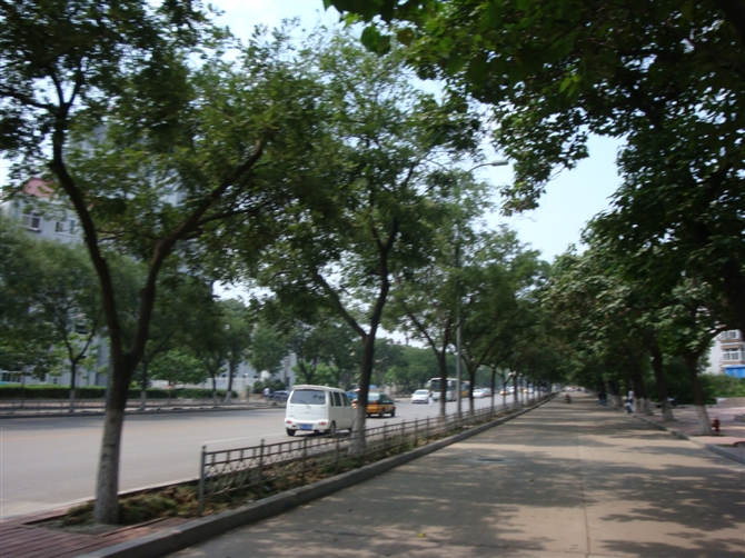 中文（中国大陆）: 河北省唐山市